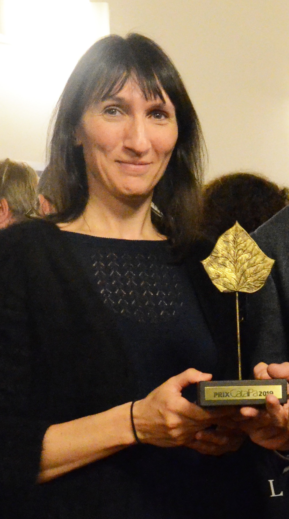 Catherine Meurisse, auteure de bande dessinée, dessinatrice de presse et d’édition, a été la Présidente d’honneur de la soirée, et a remis le Prix CatalPa 2019 au catalogue Léonard de Vinci (Louvre / Hazan). © J.-G. Lopez DR